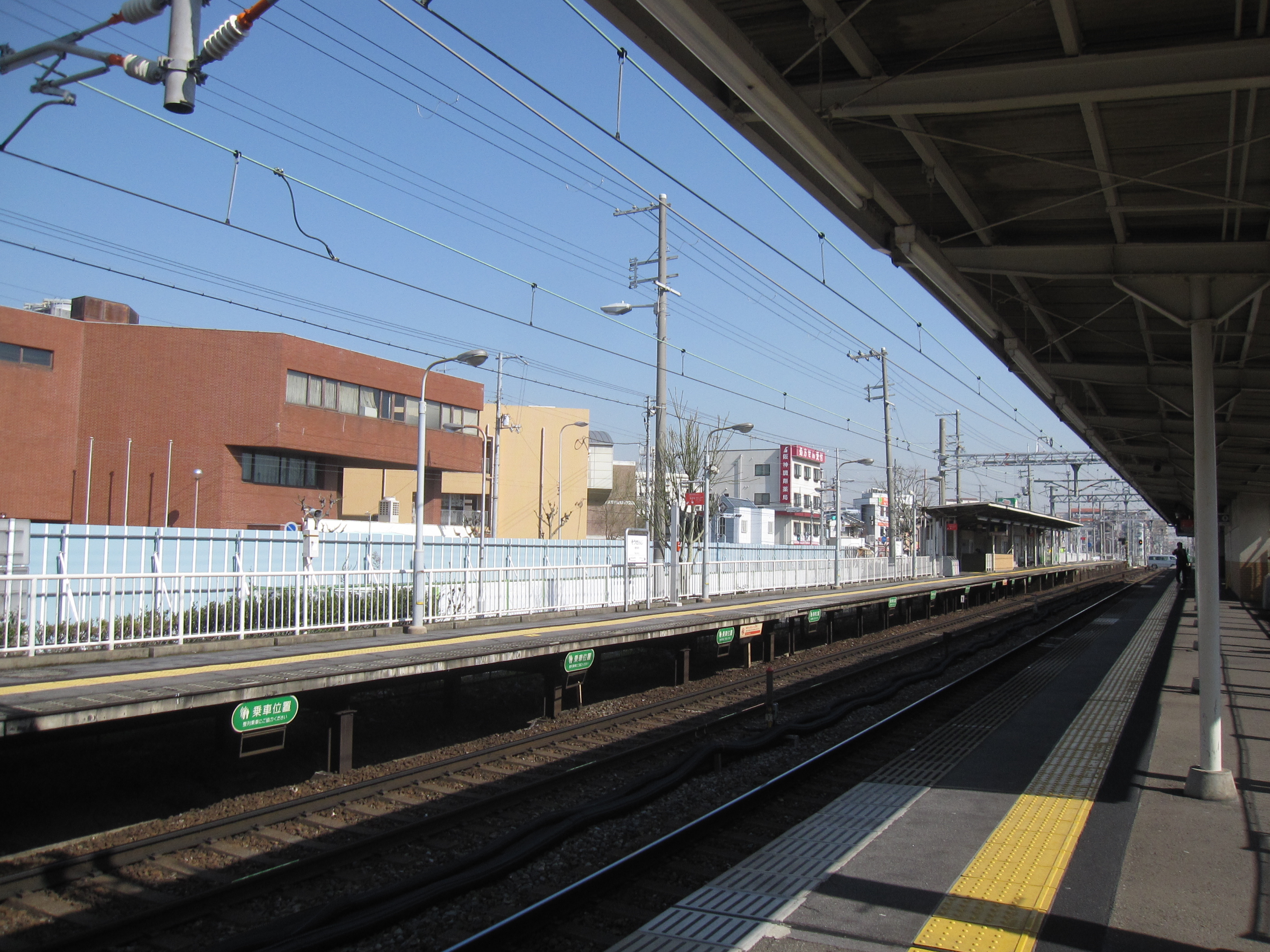 阪急 崇禅寺駅 Hankyu Sozenji Sta.